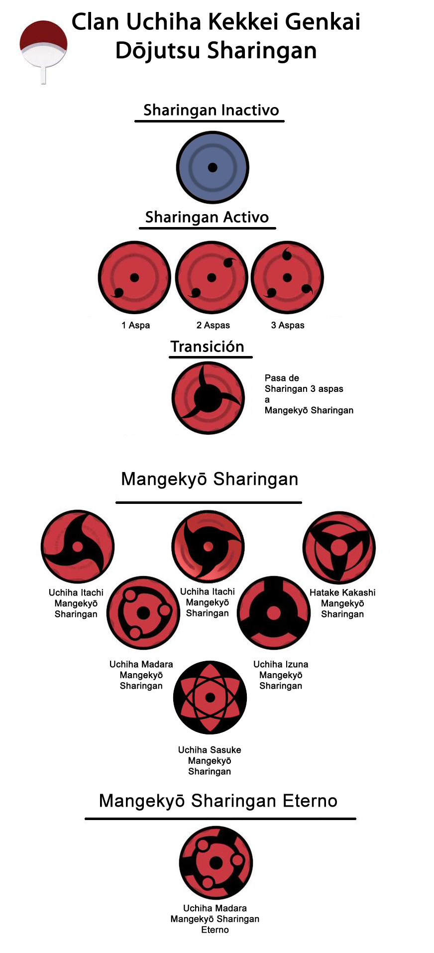 Sharingan